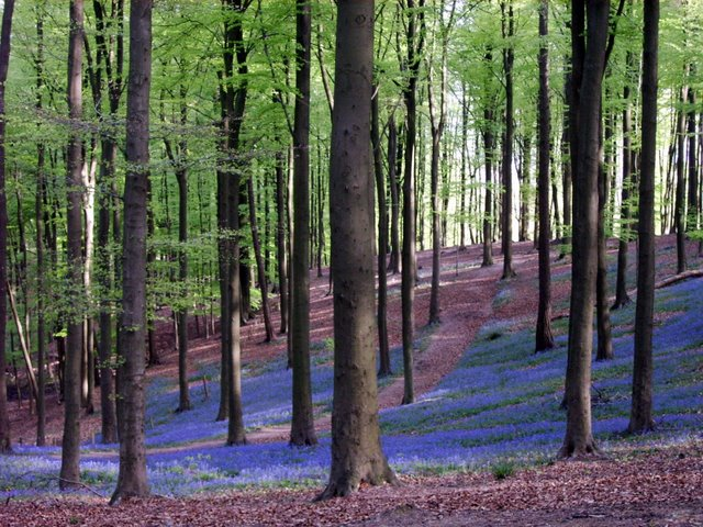 Muziekberg